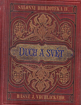 Duch a svět, básnická sbírka Jaroslava Vrchlického